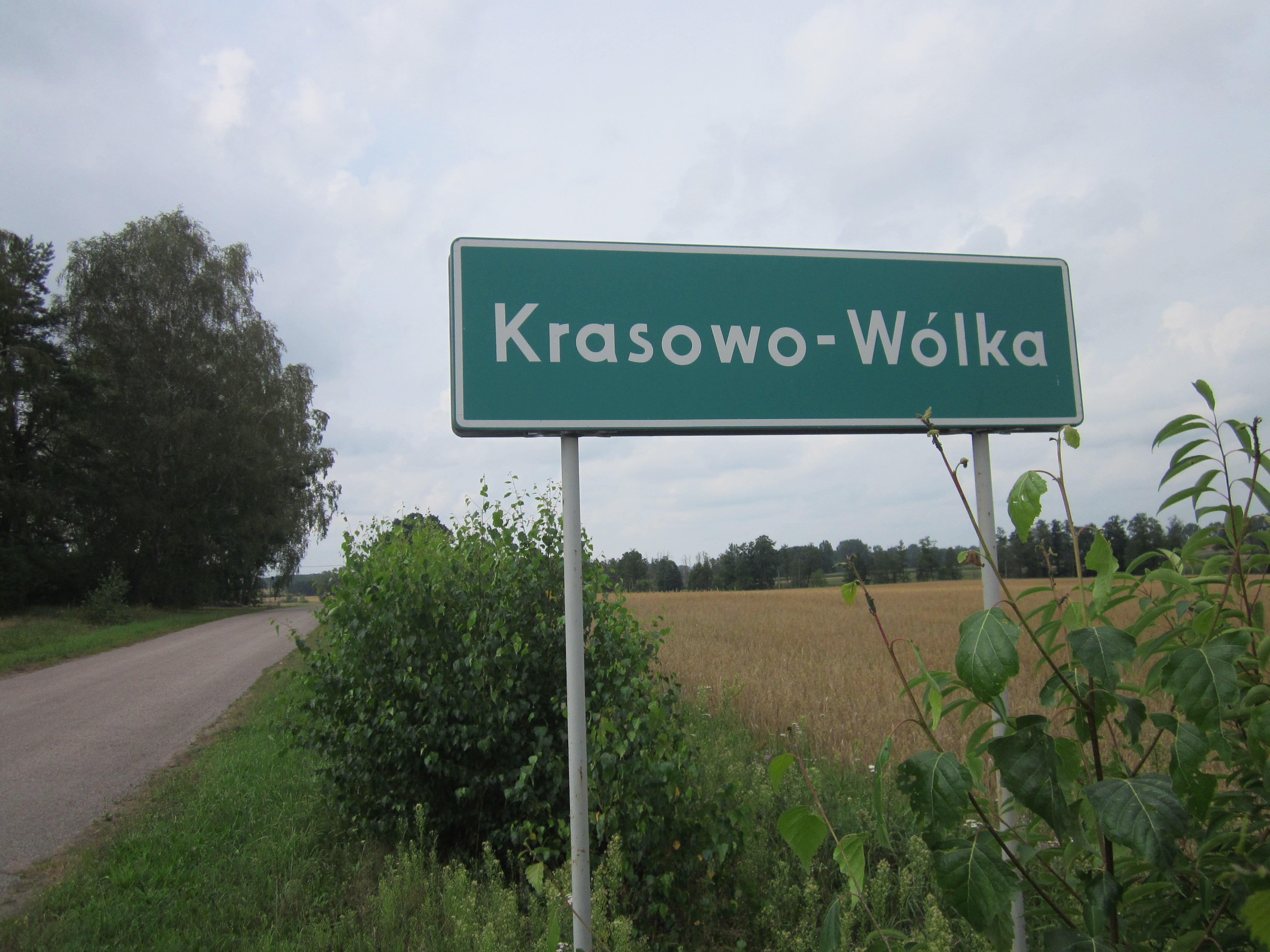 Widok od strony Krasowa Częstek.